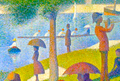 Ausschnitte aus: Georges Seurat (1859-1891), Ein Sonntagnachmittag auf der Insel La Grande Jatte (Un dimanche après-midi à l'Île de la Grande Jatte), 1884-1886, Öl auf Leinwand, 207,6x308 cm, Art Institute of Chicago.